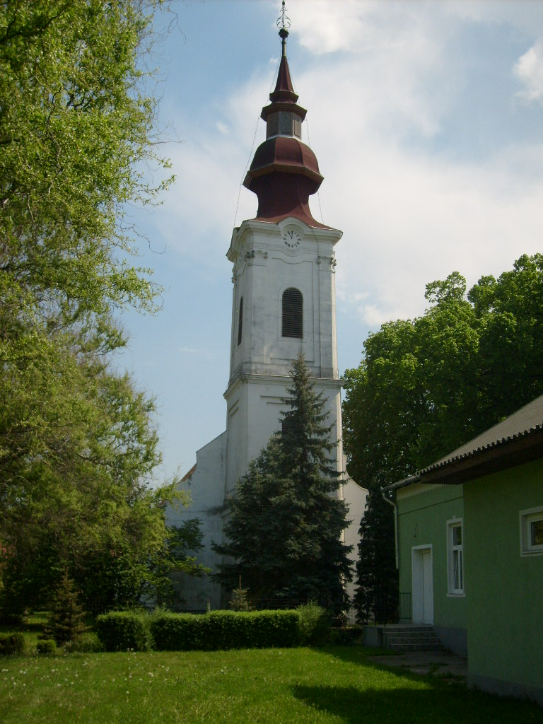 A sajóvelezdi református templom.